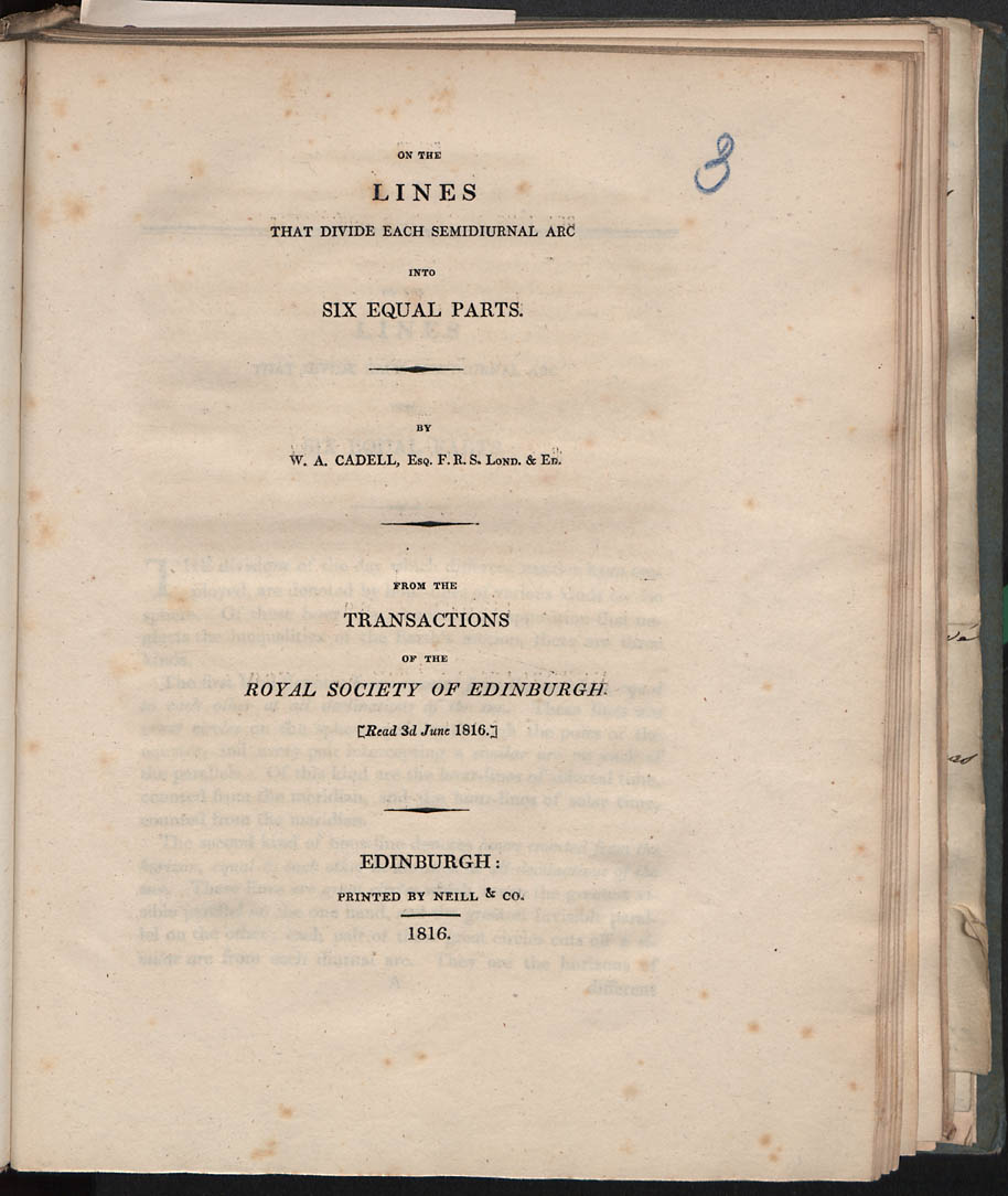 Frontespizio